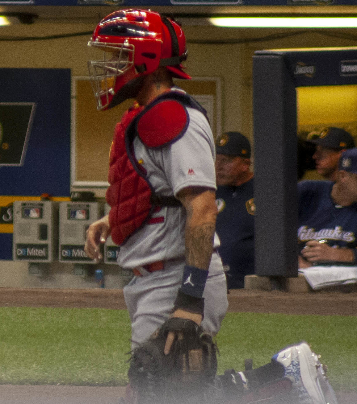 Yadier Molina